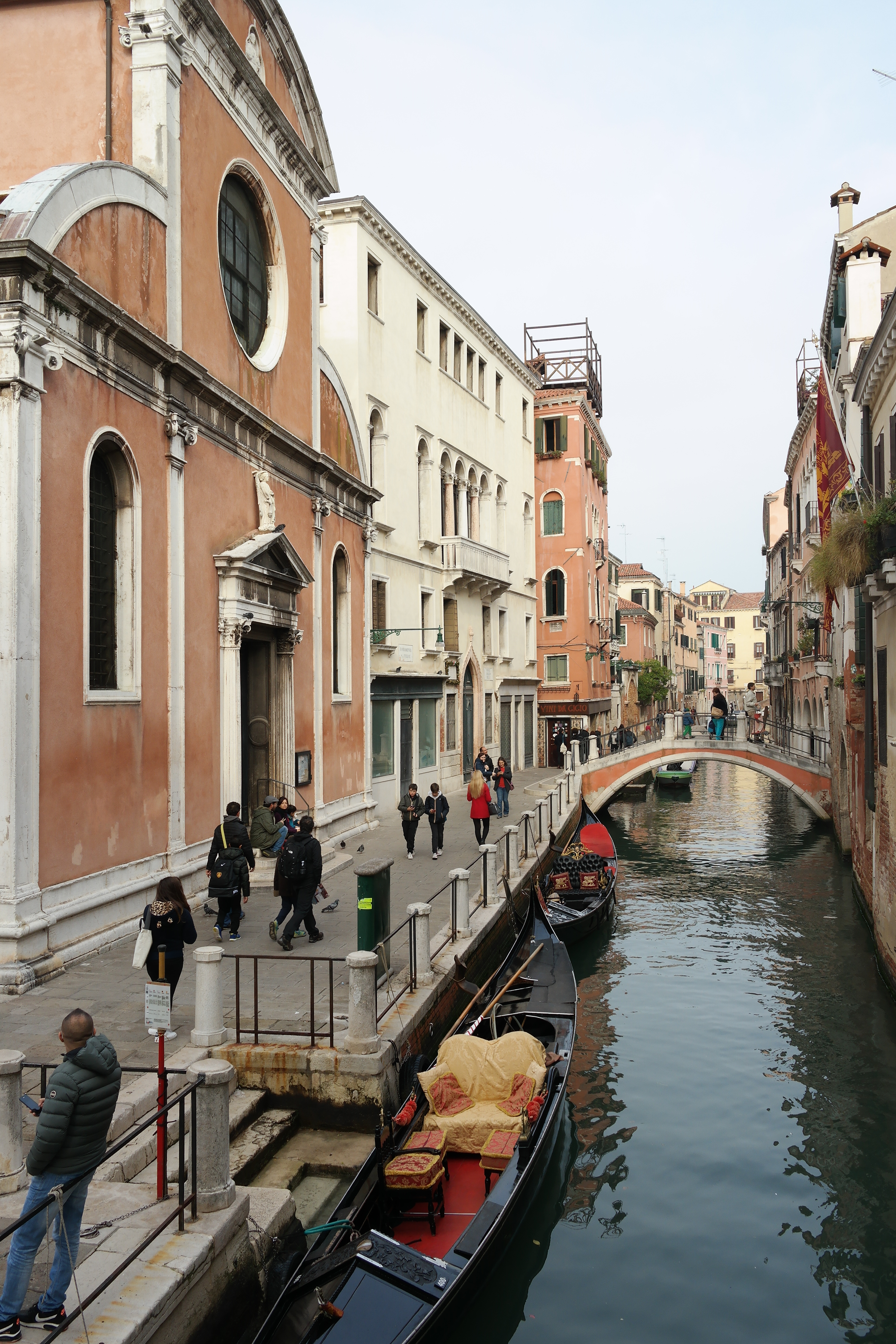 Rio di San Felice a Venezia e omonima chiesa sulla destra